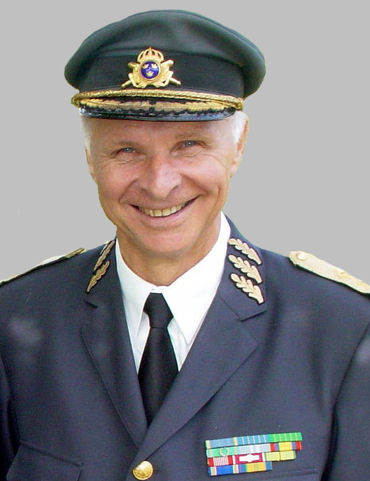 Generalmajor Alf Sandqvist